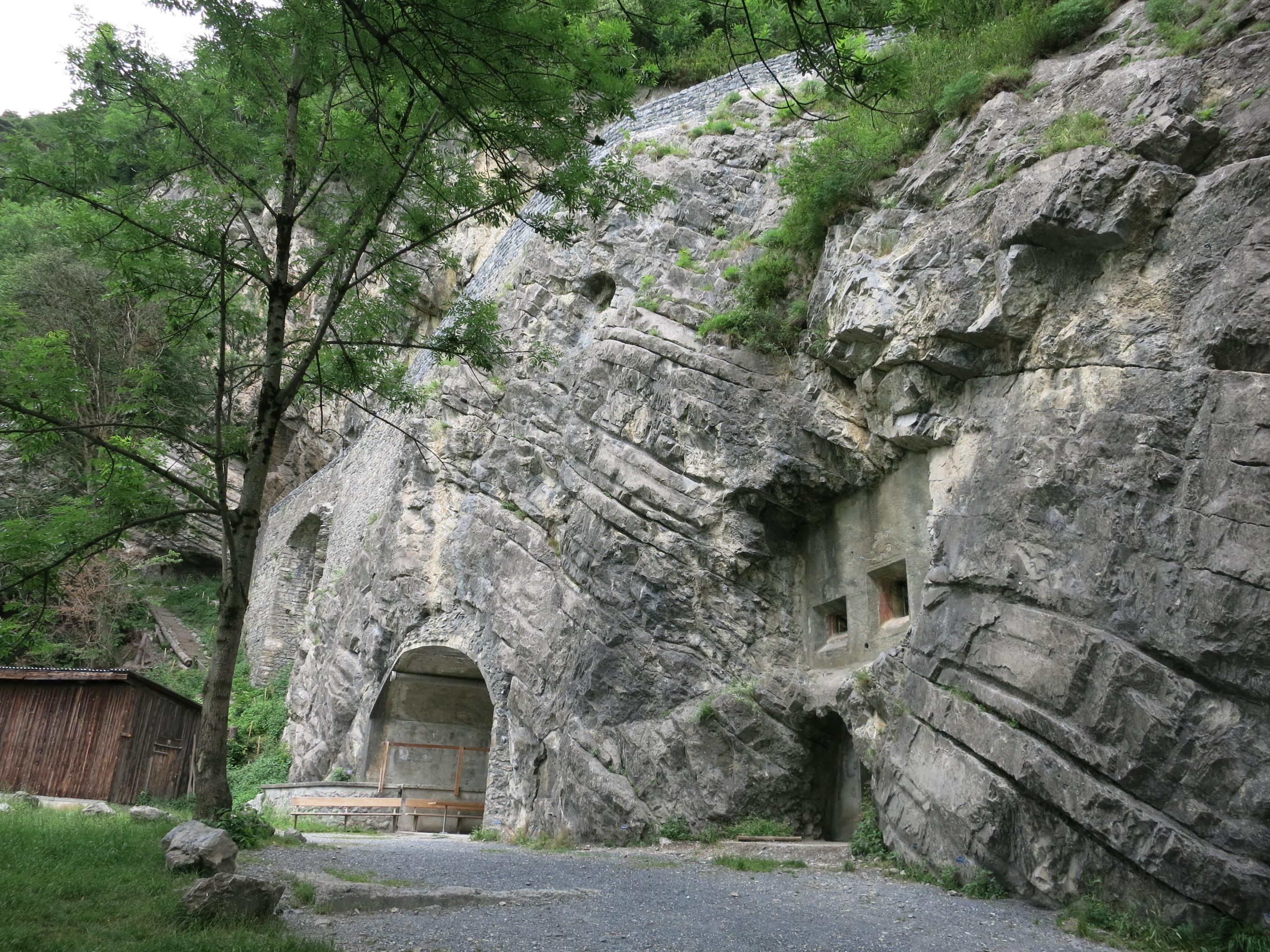 Festung Schollberg SG, Schweiz